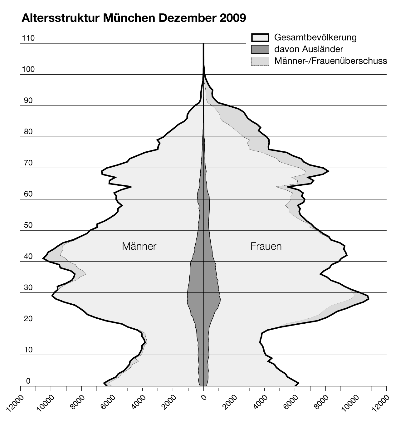 Bevölkerungspyramide München (stand: Dezember 2010)